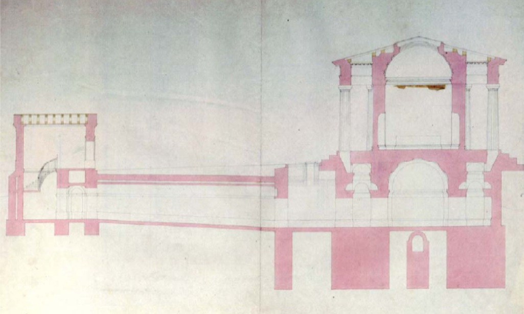 Querschnittsplan des Theseustempel in Wien, Volksgarten